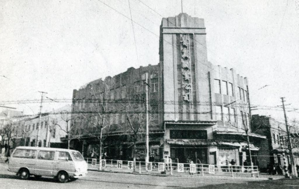 青岛国货公司